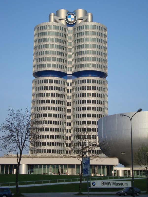 Prédio da BMW na Alemanha.